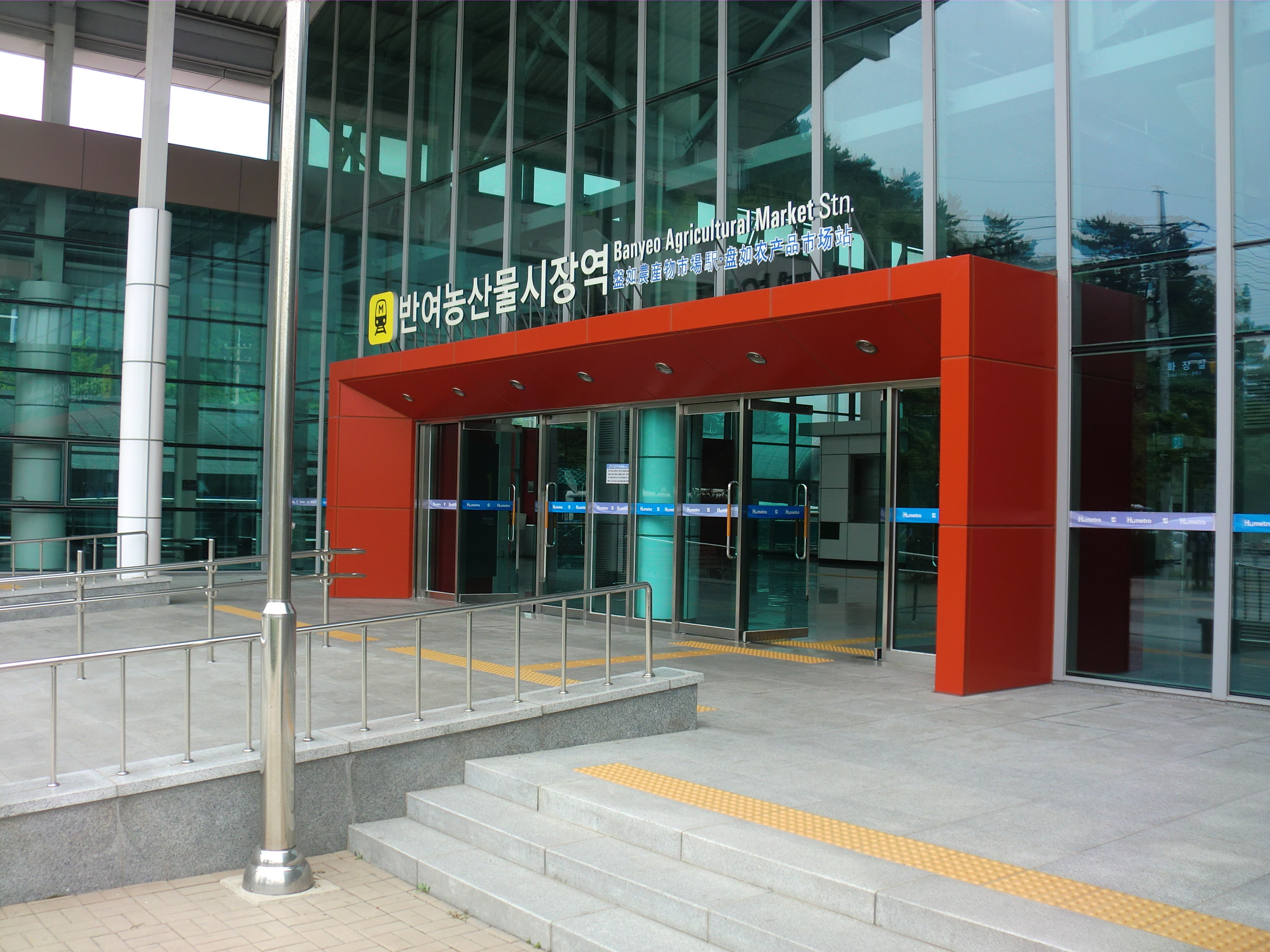 부산도시철도4호선 반여농산물시장역 출입구